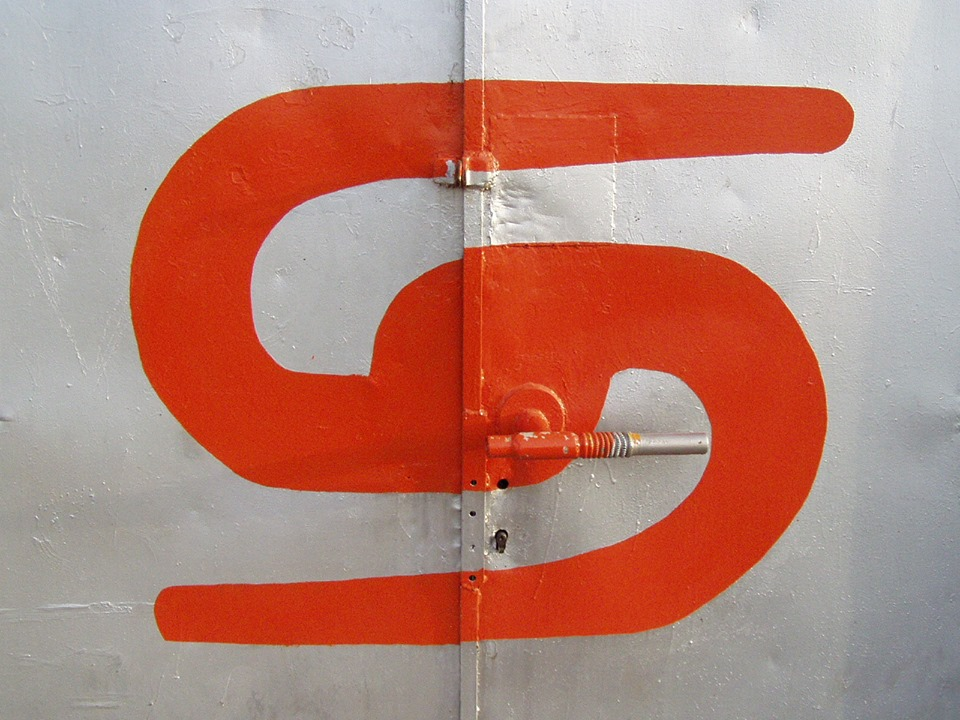 Logo art tima Supercraft